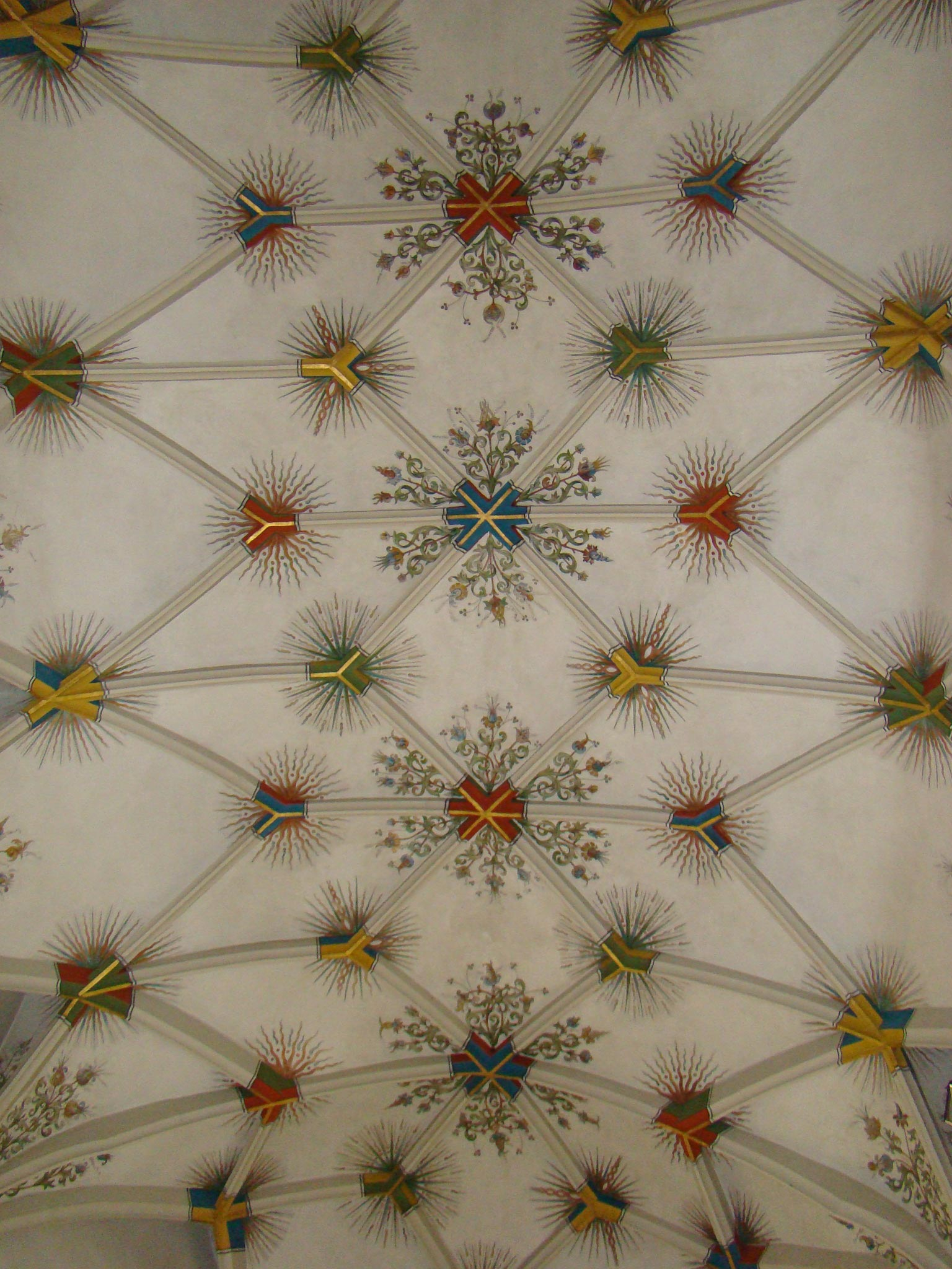 Pfarrkirche St. Hippolyt, Ottmarsheim